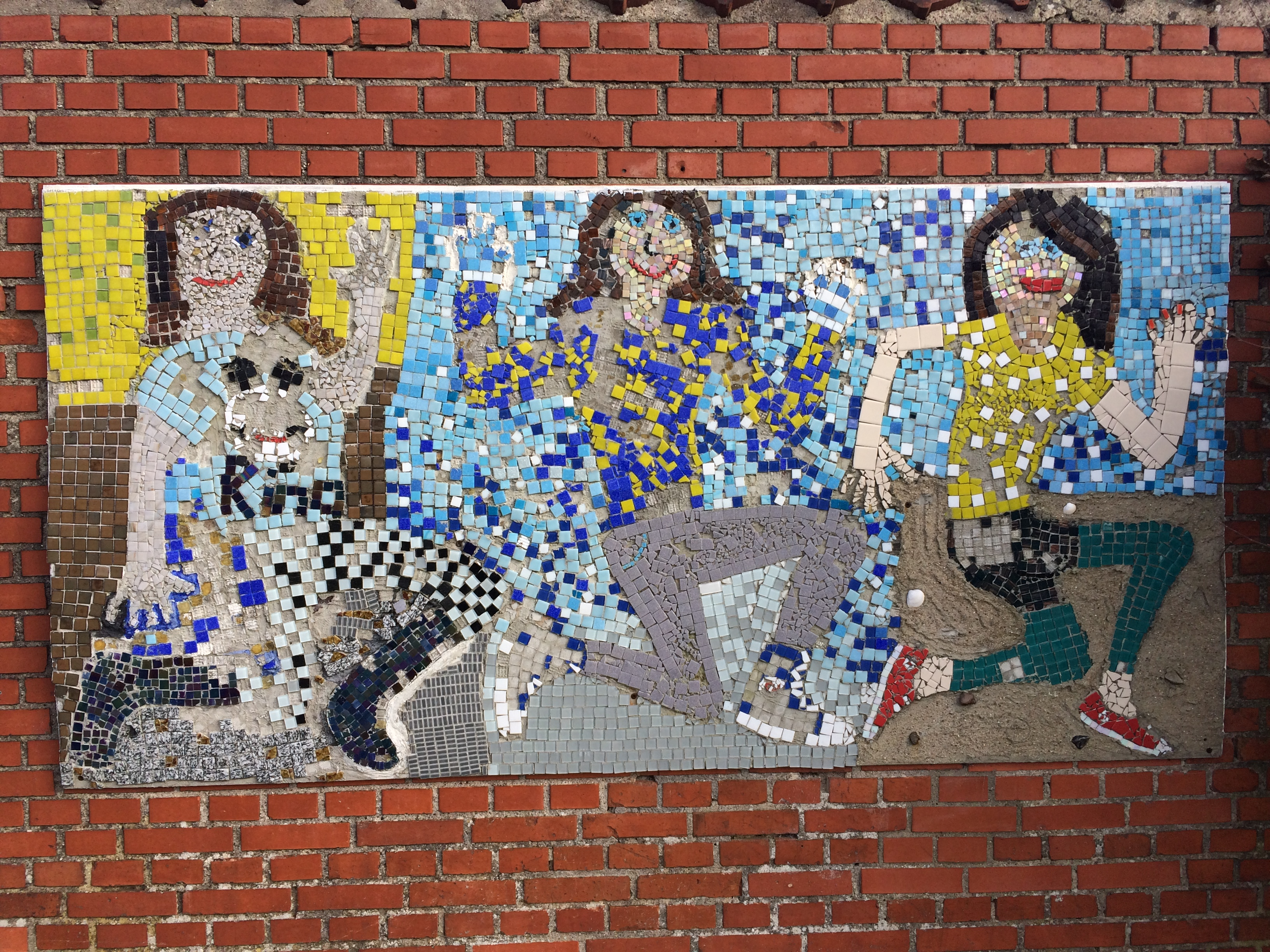 Mosaic art made by public school students at Tallerup School